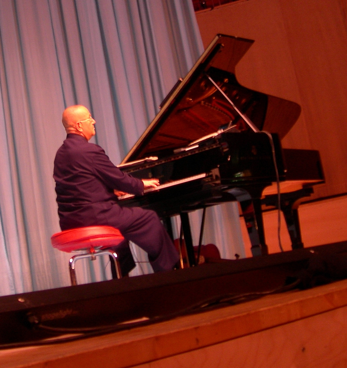 Hans Liberg, Dutch pianist